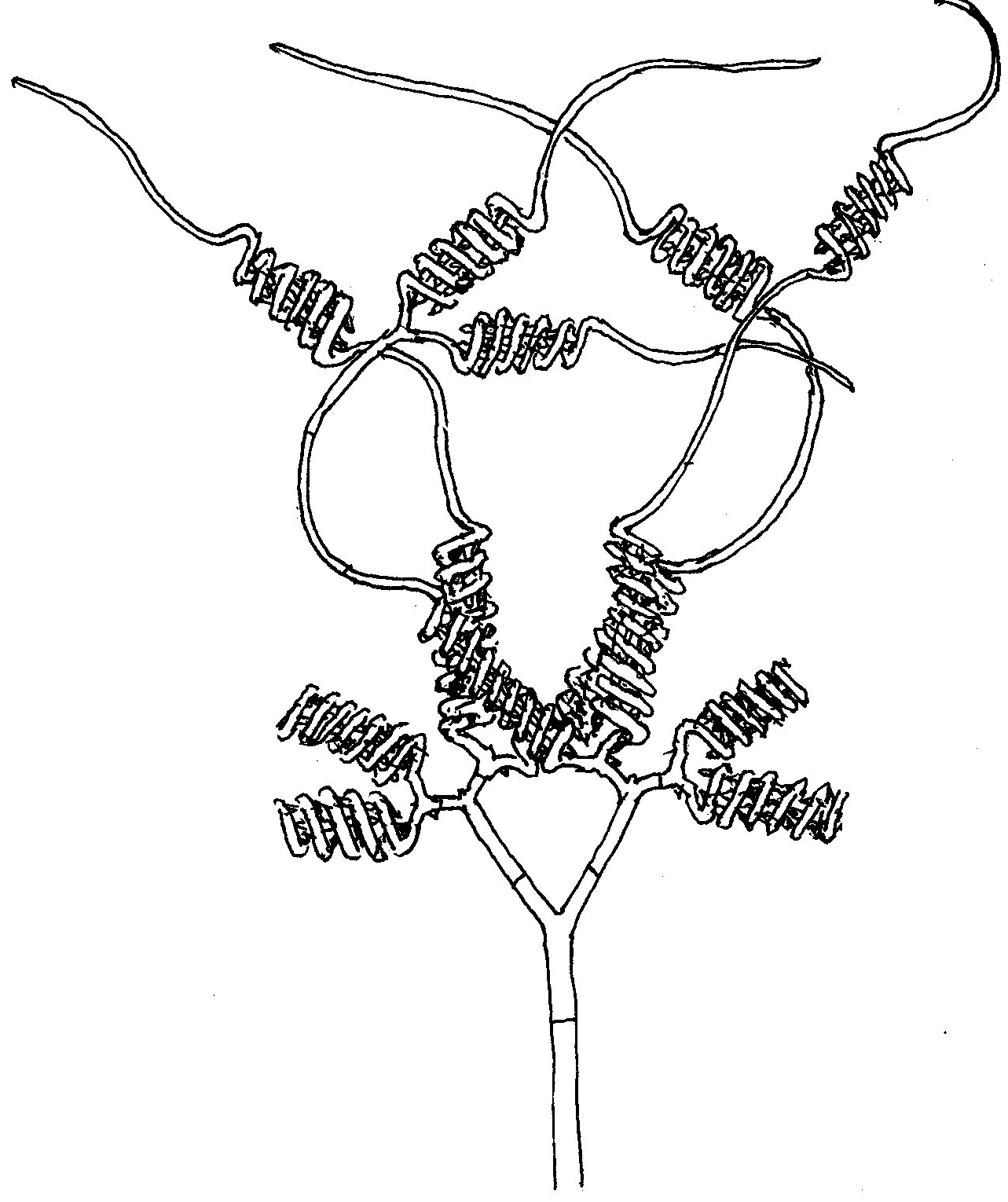 R. K. Benjamin (1959)より模写